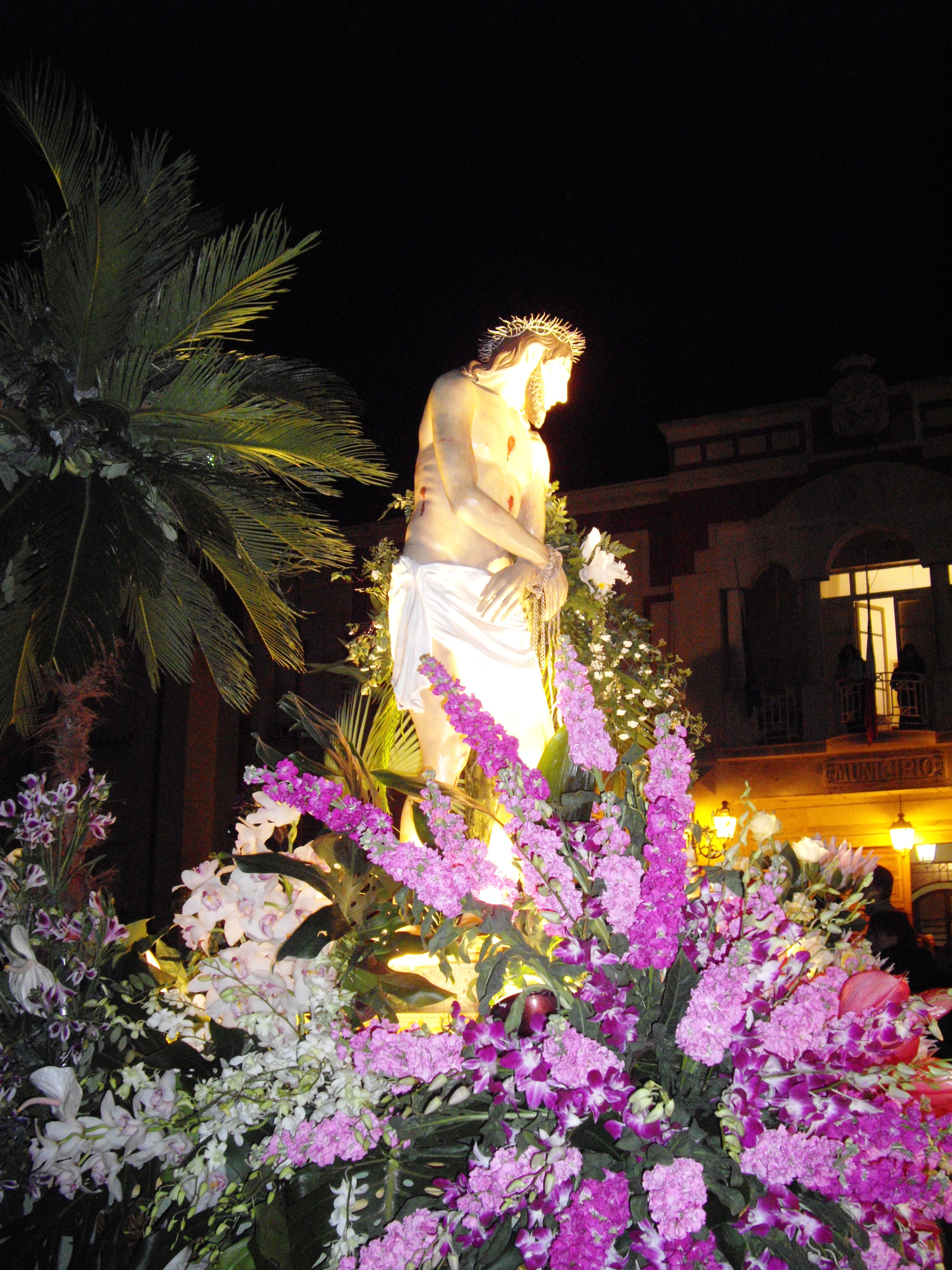 Pasqua 2009